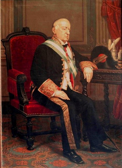 Retrato del aristócrata español José Rafael de Silva Fernández de Híjar (1776-1863), XII duque de Híjar.